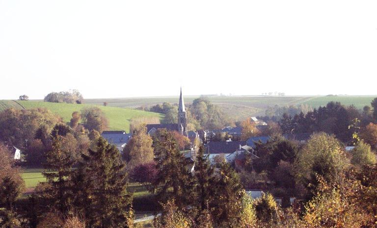 Vue générale du village de Remaucourt.